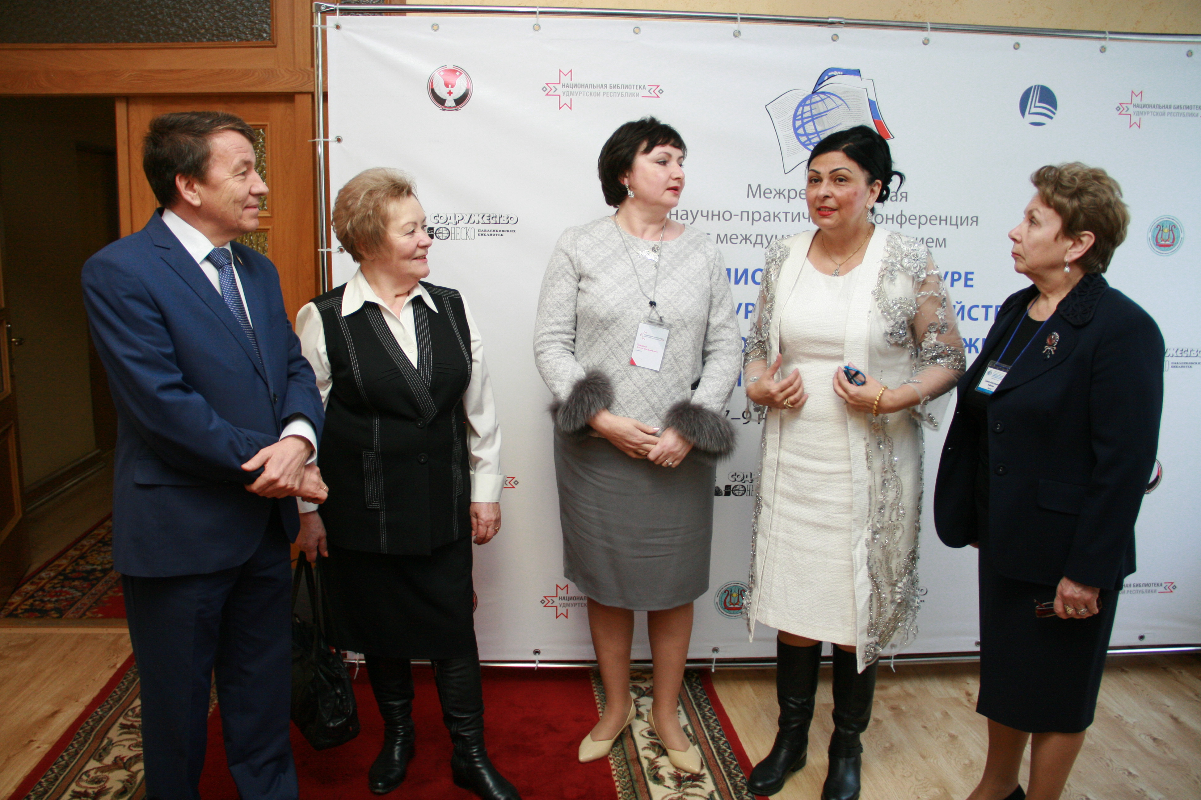 Lətifə Məmmədova Udmurt Milli Kitabxanasının dostları ilə